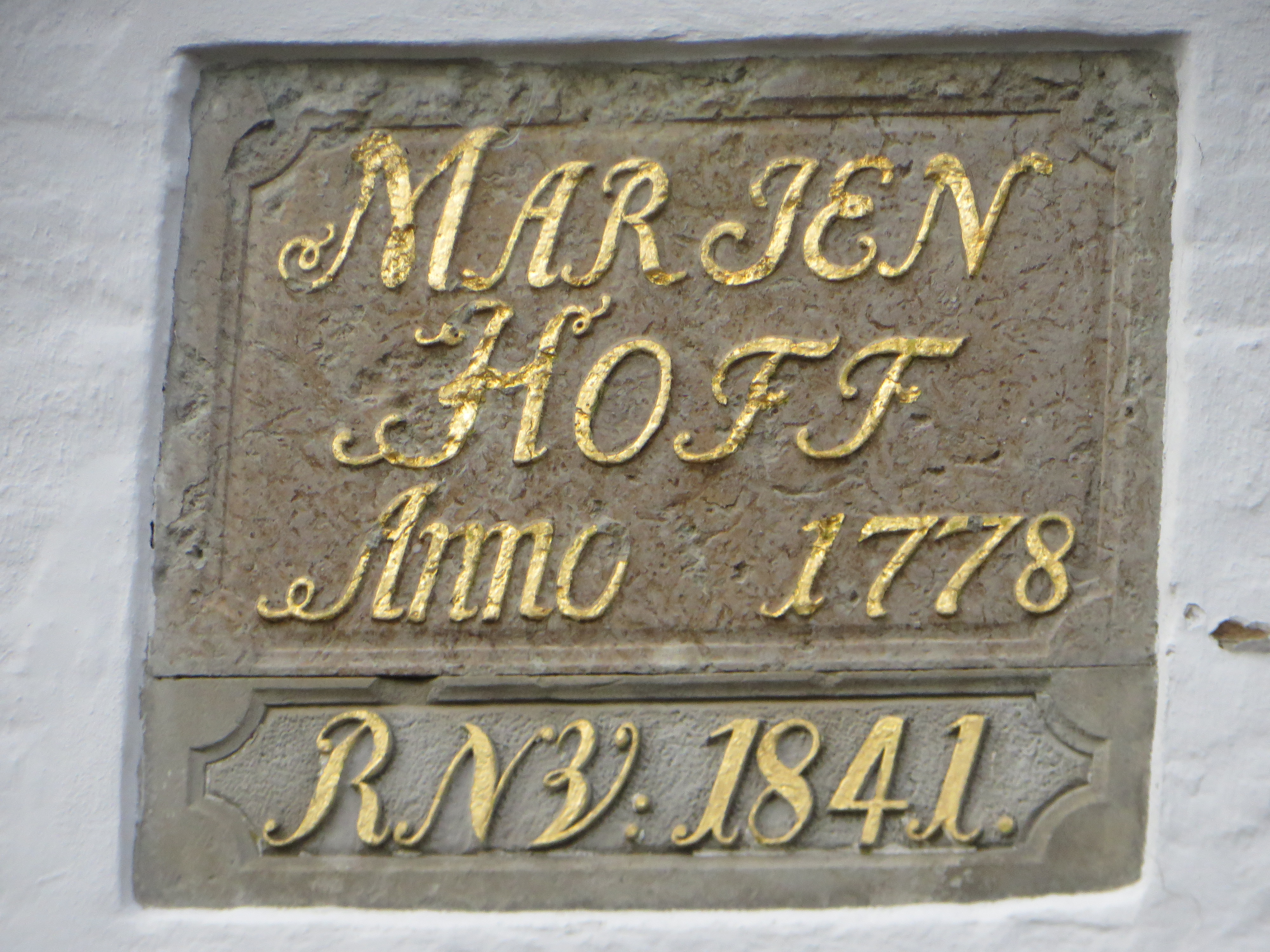 Tafel Marienhof Anno 1778, Nerongsallee 22 (Flensburg April 2018), Bild 02